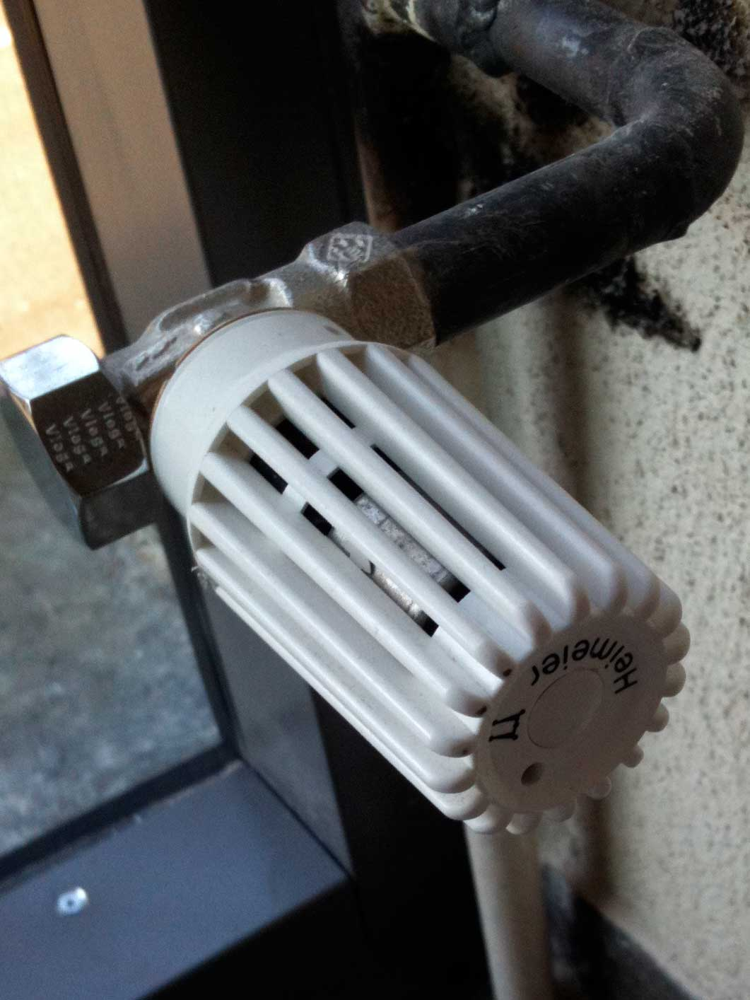 Behördenmodell eines Heizkörperthermostats